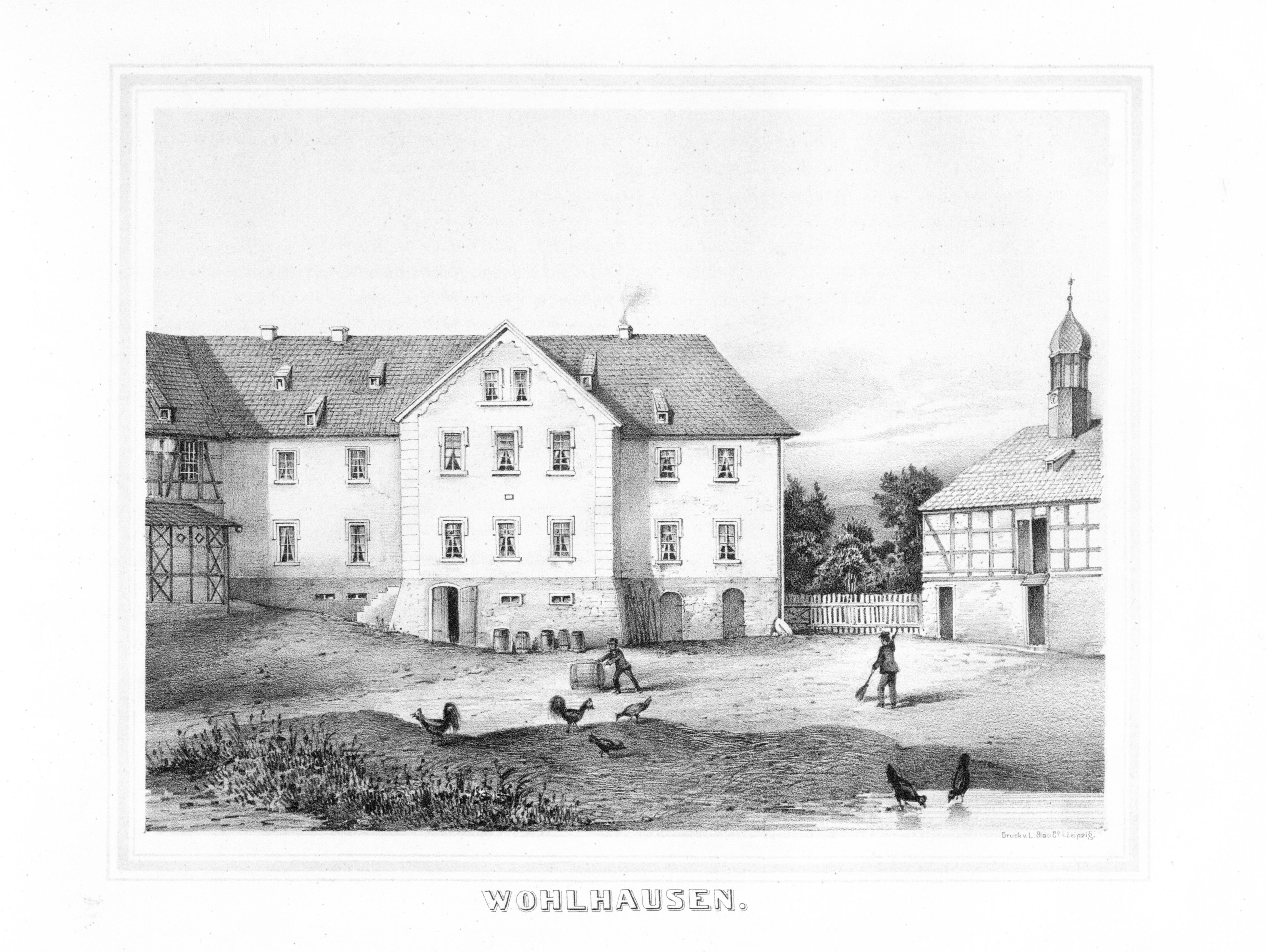 Wohlhausen aus: Album der Rittergüter und Schlösser im Königreiche Sachsen Voigtländischer Kreis Section: V